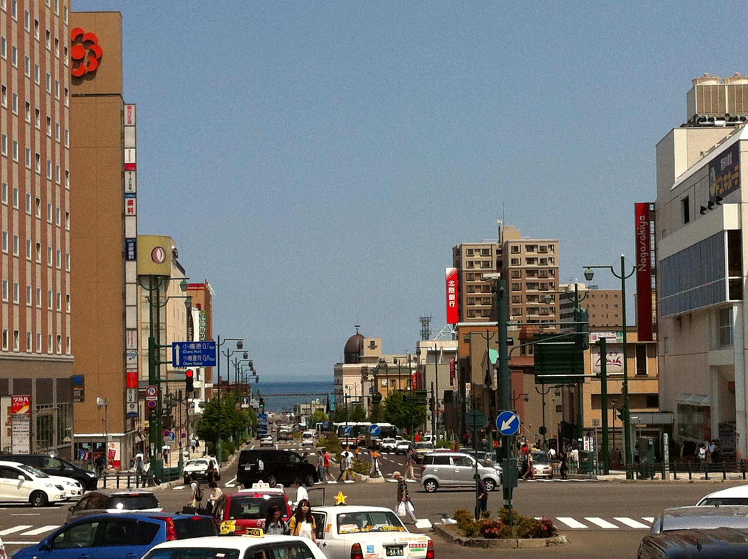 3 Chome Inaho, Otaru-shi, Hokkaidō 047-0032, Japan